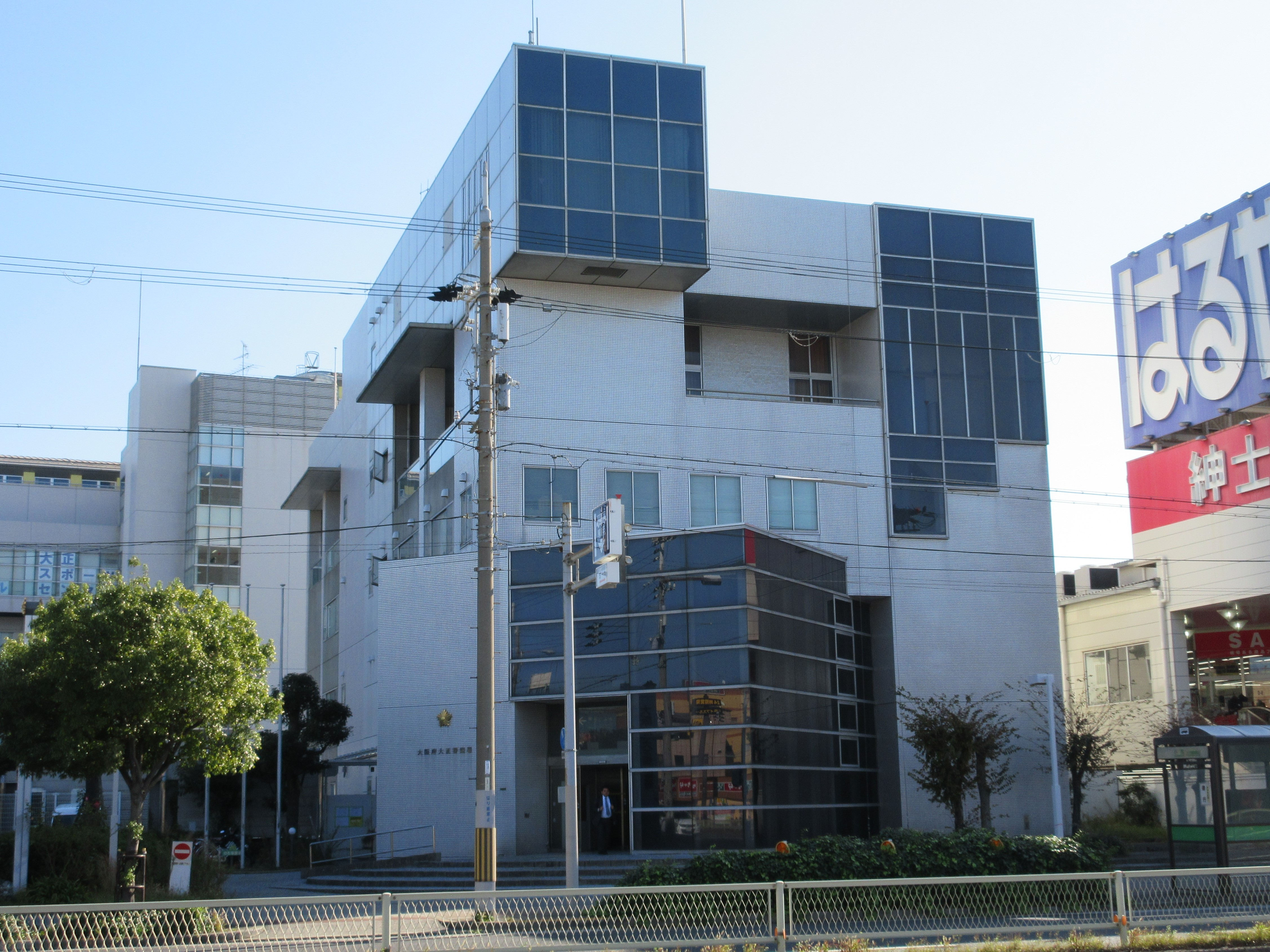 大正警察署